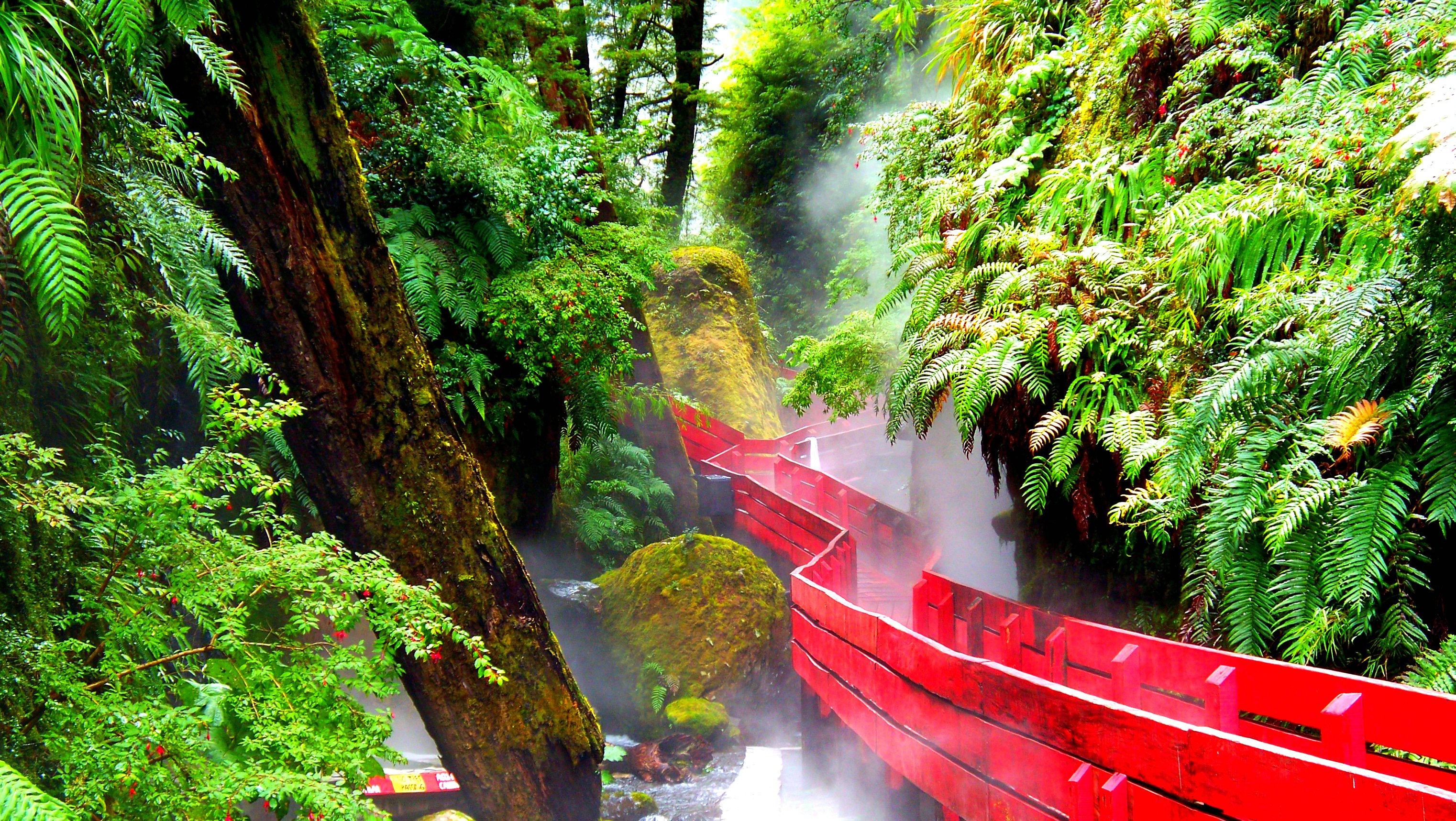 Termas geométricas ubicadas entre Coñaripe y Pucón.